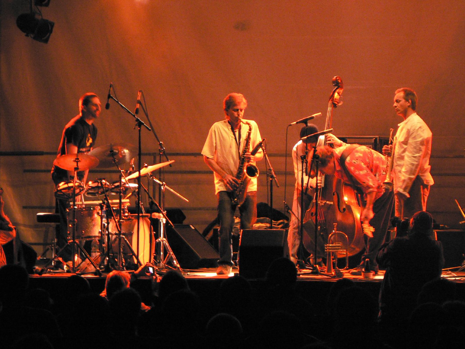 Maak's Spirit